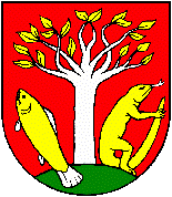 Герб с. Брегов: герб села